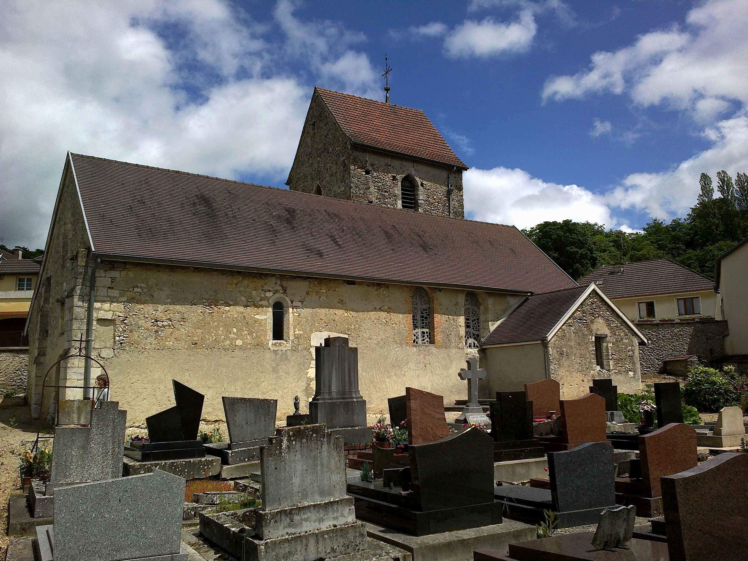 Marne Cormoyeux Eglise Saint-Clement Cote Sud 22062016